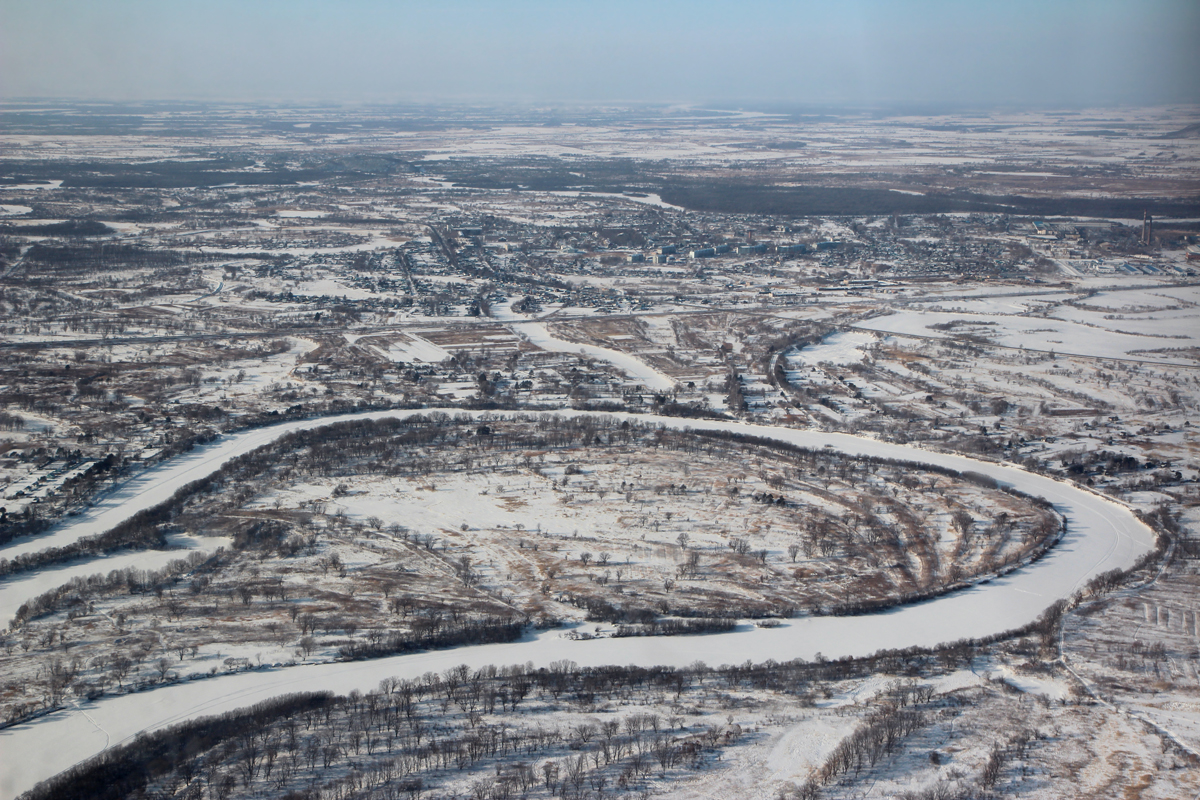 Вид на Дальнереченск при заходе на посадку